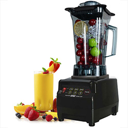 Markedets beste og rimeligste blender. Meget kraftig og driftsikker. Selges hos Yanilla.no